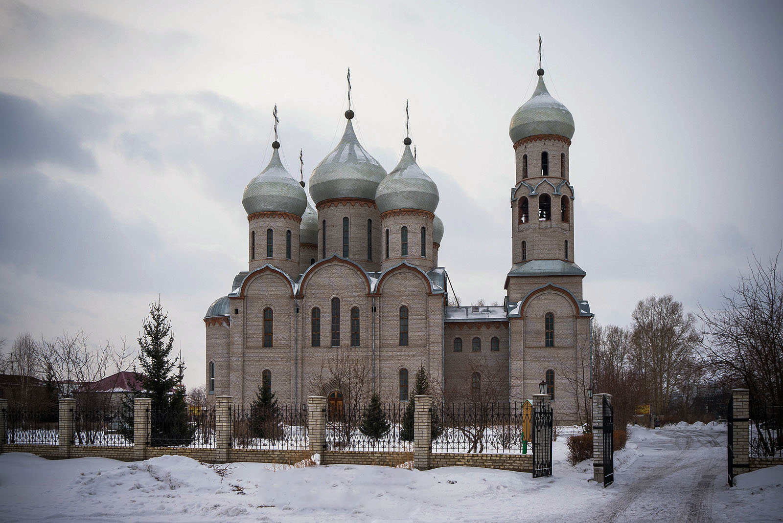 Свято-Троицкий собор, Шарыпово, Красноярский край